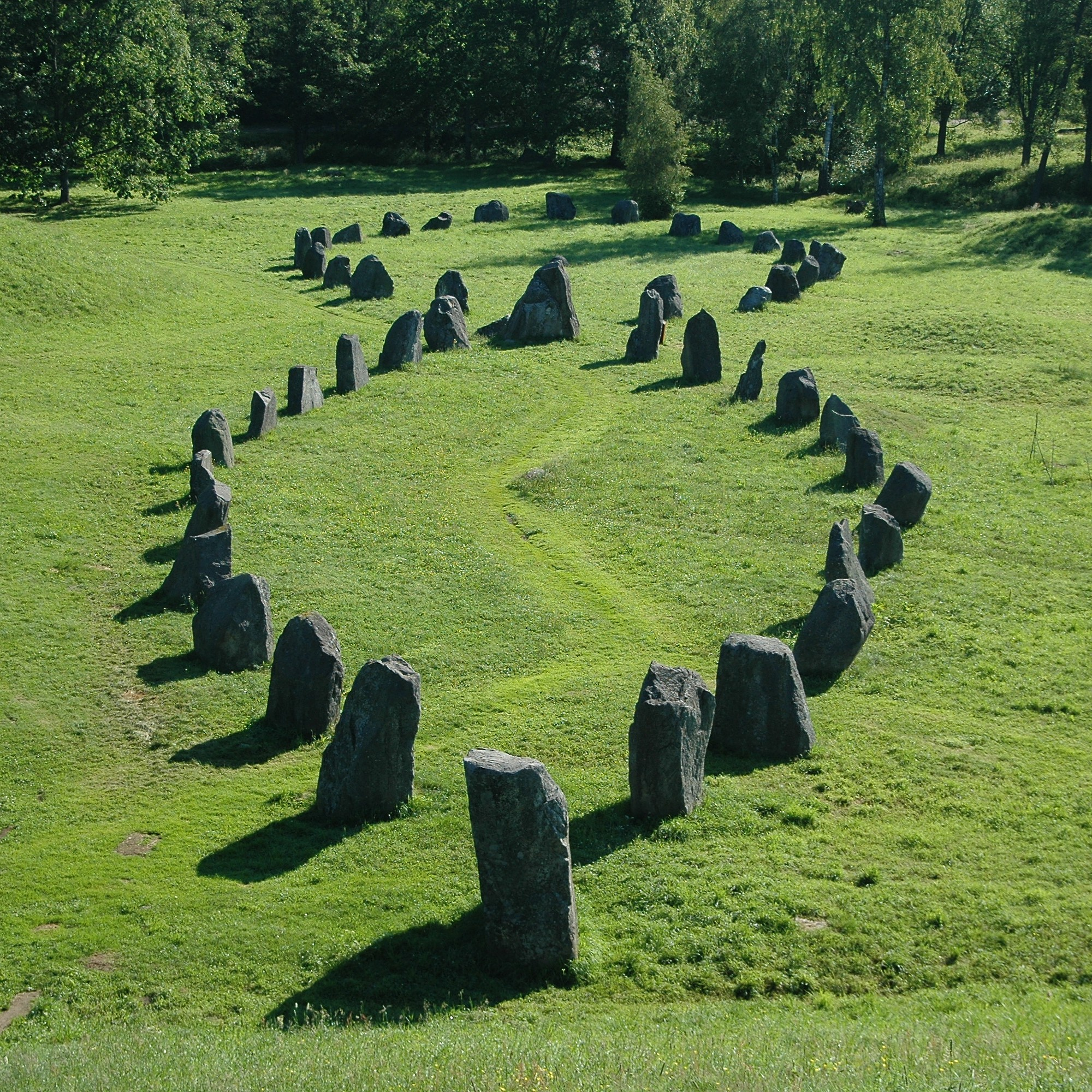 Anundshög, Västerås